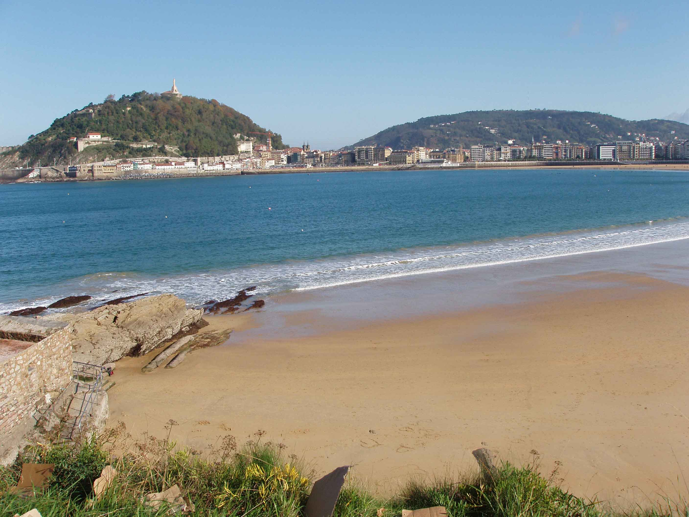 San Sebastián - Donostia. Vista de la playa de la Concha y Monte Urgull. Fotografía del autor, Bernardo Inza.